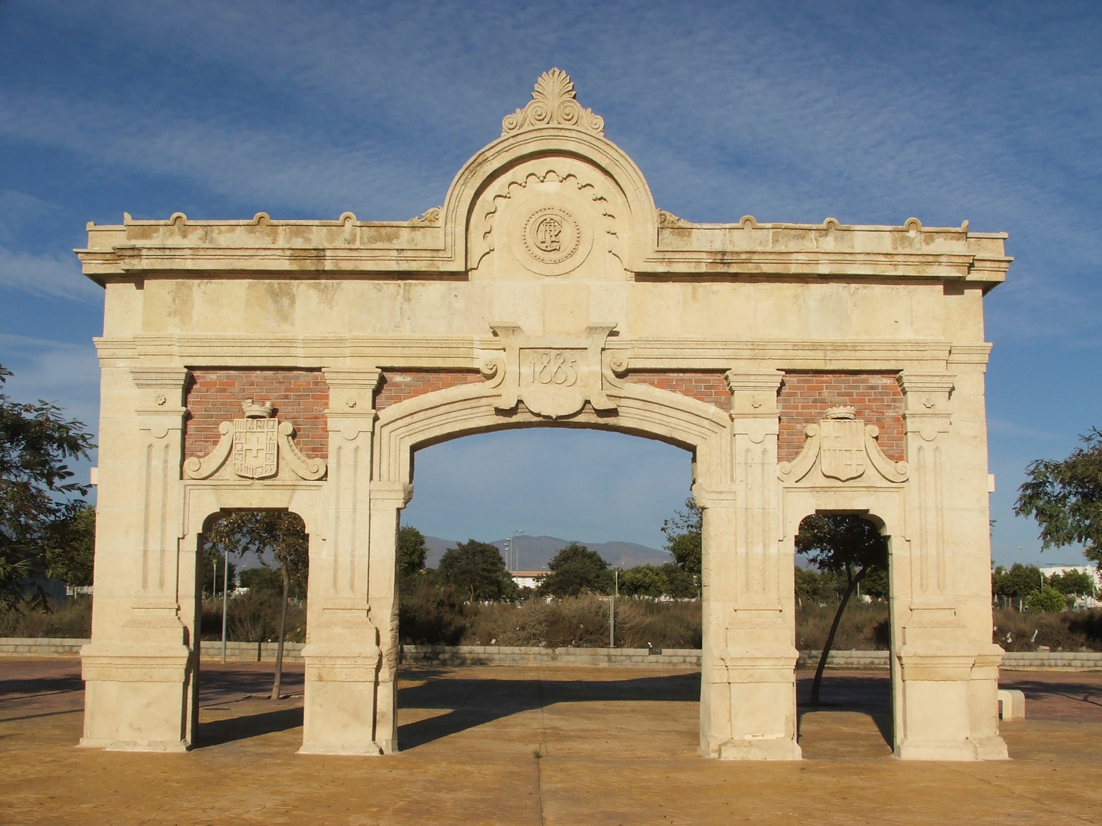 Fotografía de la Puerta del antiguo Ingenio de Azúcar y luego también prisión en la ciudad de Almería, Andalucía, España.